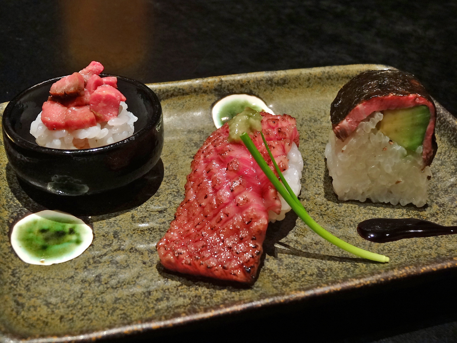 和牛寿司 （京やきにく弘・八坂邸）